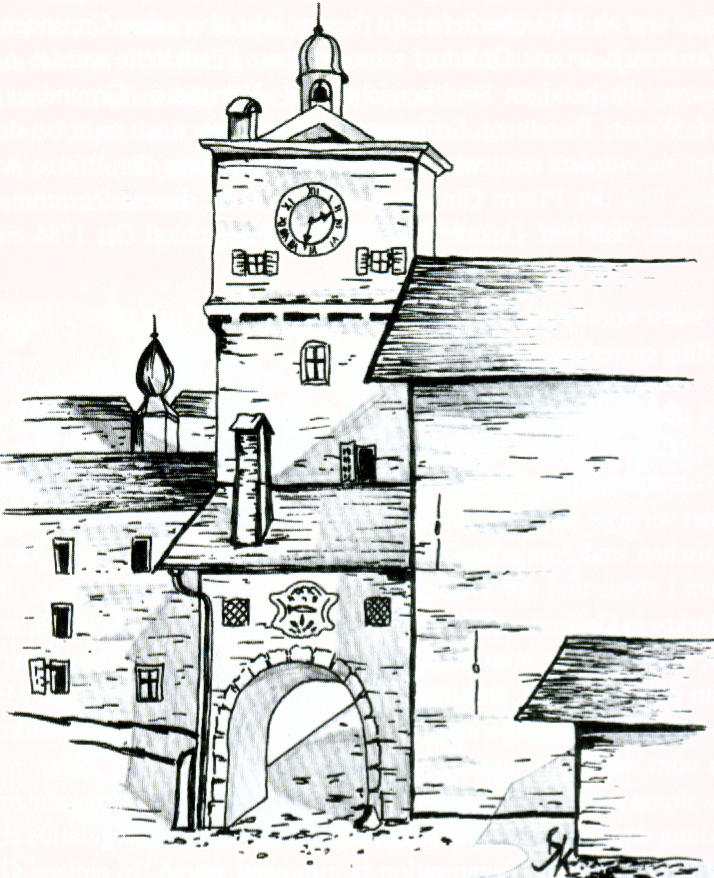 Plan, Gmunden, 1849